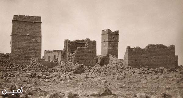 منظر عام لام القطين في عام 1903 م